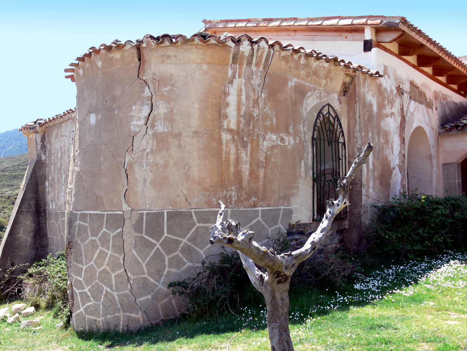 Ermita de Santa María de Peñalba, Arnedillo (La Rioja - España).